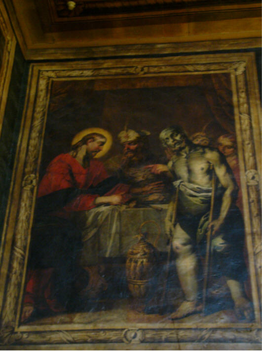 Bild aus dem Wunderzyklus von Isaac Moillon